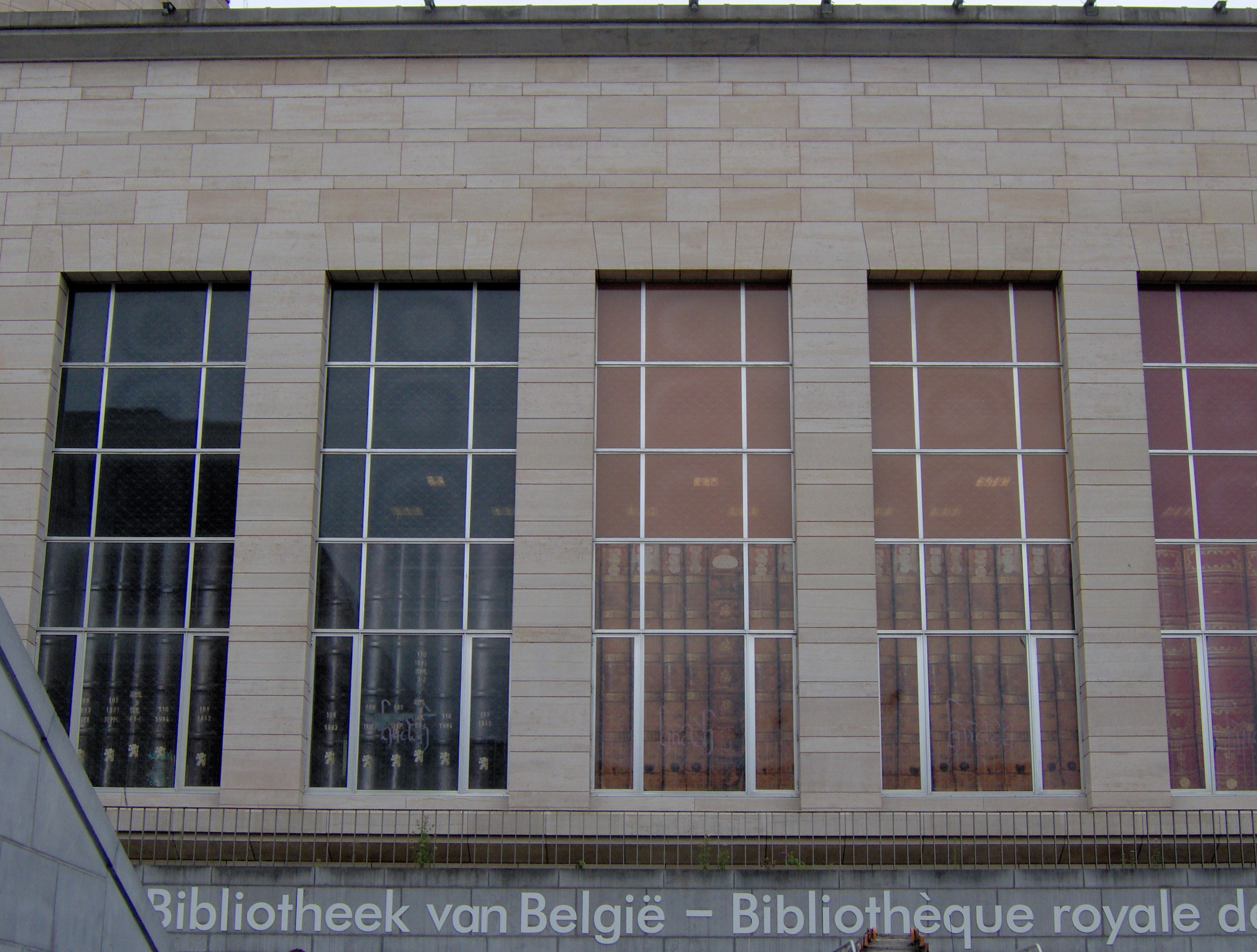 Bogforsider i vinduerne! cool!